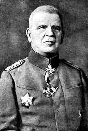 Max v. Boehn